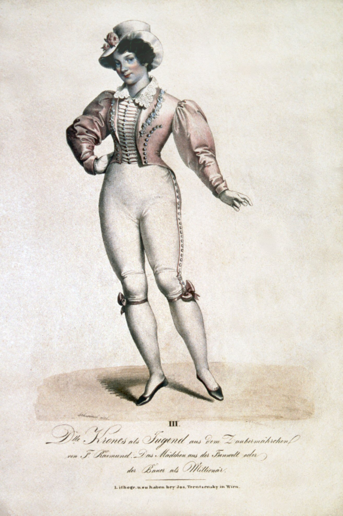 Therese Krones (1801-1830) als Jugend in "Das Mädchen aus er Feenwelt oder Der Bauer als Millionär".